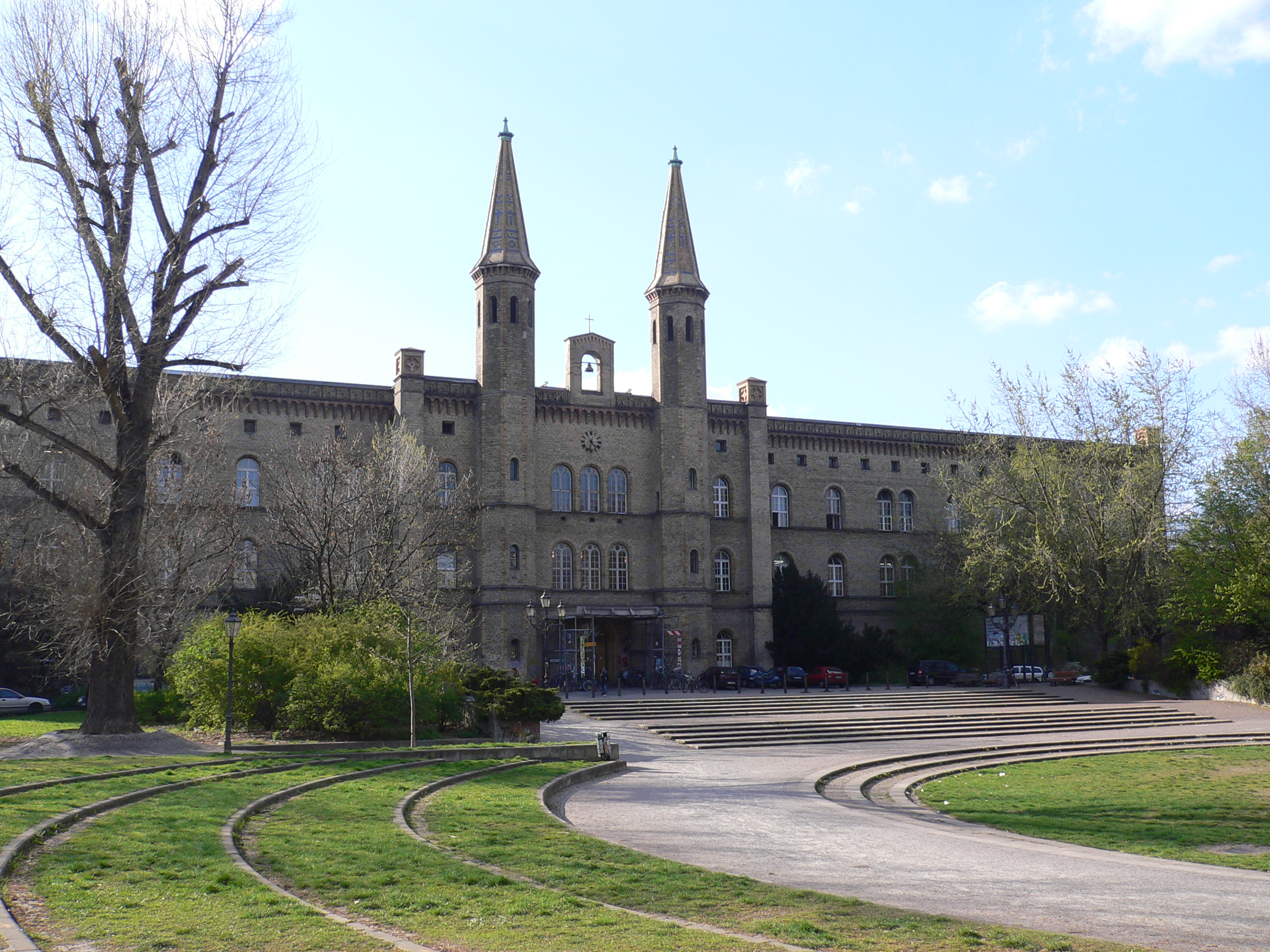 Berlin-Kreuzberg, Mariannenplatz – früheres Krankenhaus Bethanien, heute Künstlerhaus / former Hospital Bethanien gestiftet 1843 von Friedrich Wilhelm IV. als Stätte des "Schwanenordens"; erbaut 1845-47 von Theodor Stein nach Plänen von Ludwig Persius, gedacht als Lehrkrankenhaus für Diakonissen; am 10. Oktober 1847 durch Bischof Neander eingeweiht; Theodor Fontane war hier Apotheker